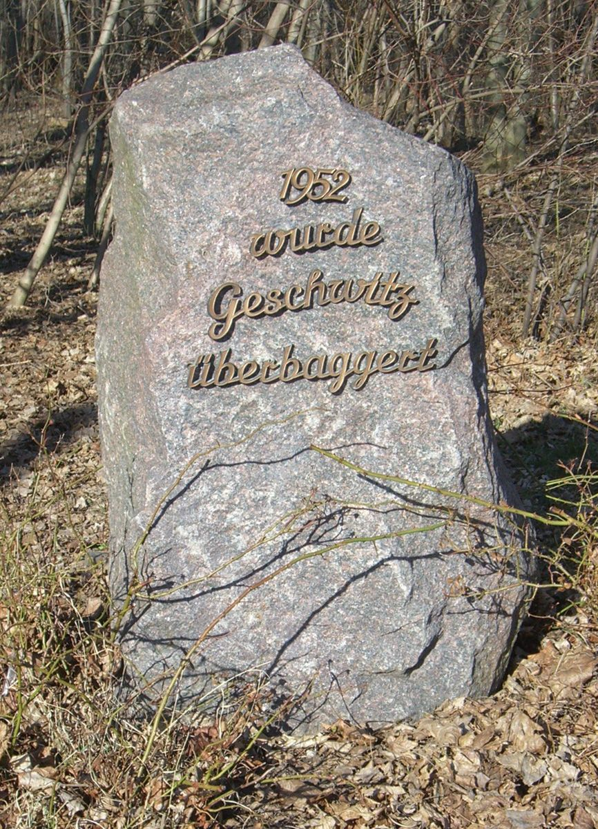 Gedenkstein an das abgebaggerte Dorf Geschwitz (zuletzt Ortsteil von Rötha)